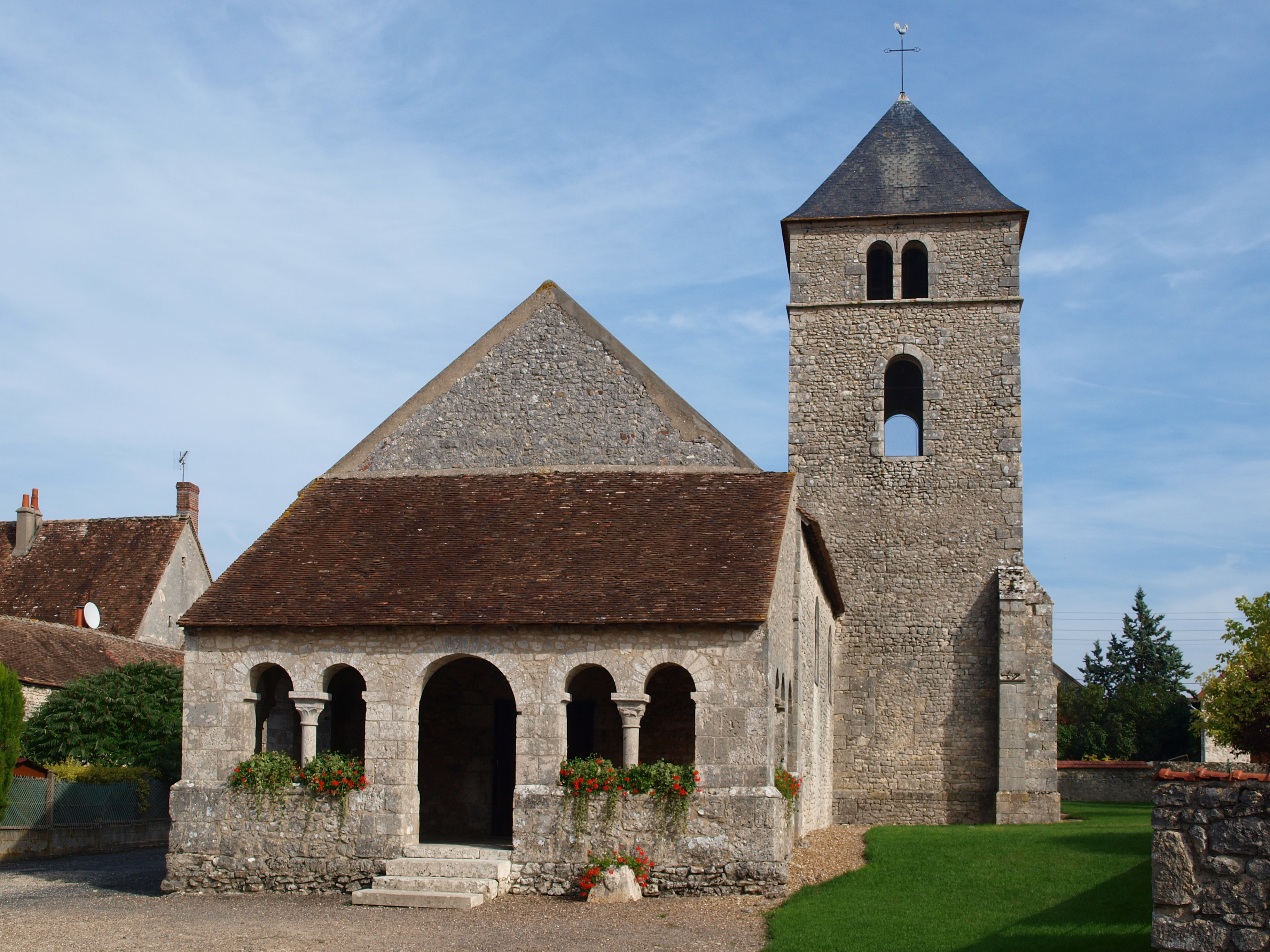 Préfontaines (Loiret, France) ; église